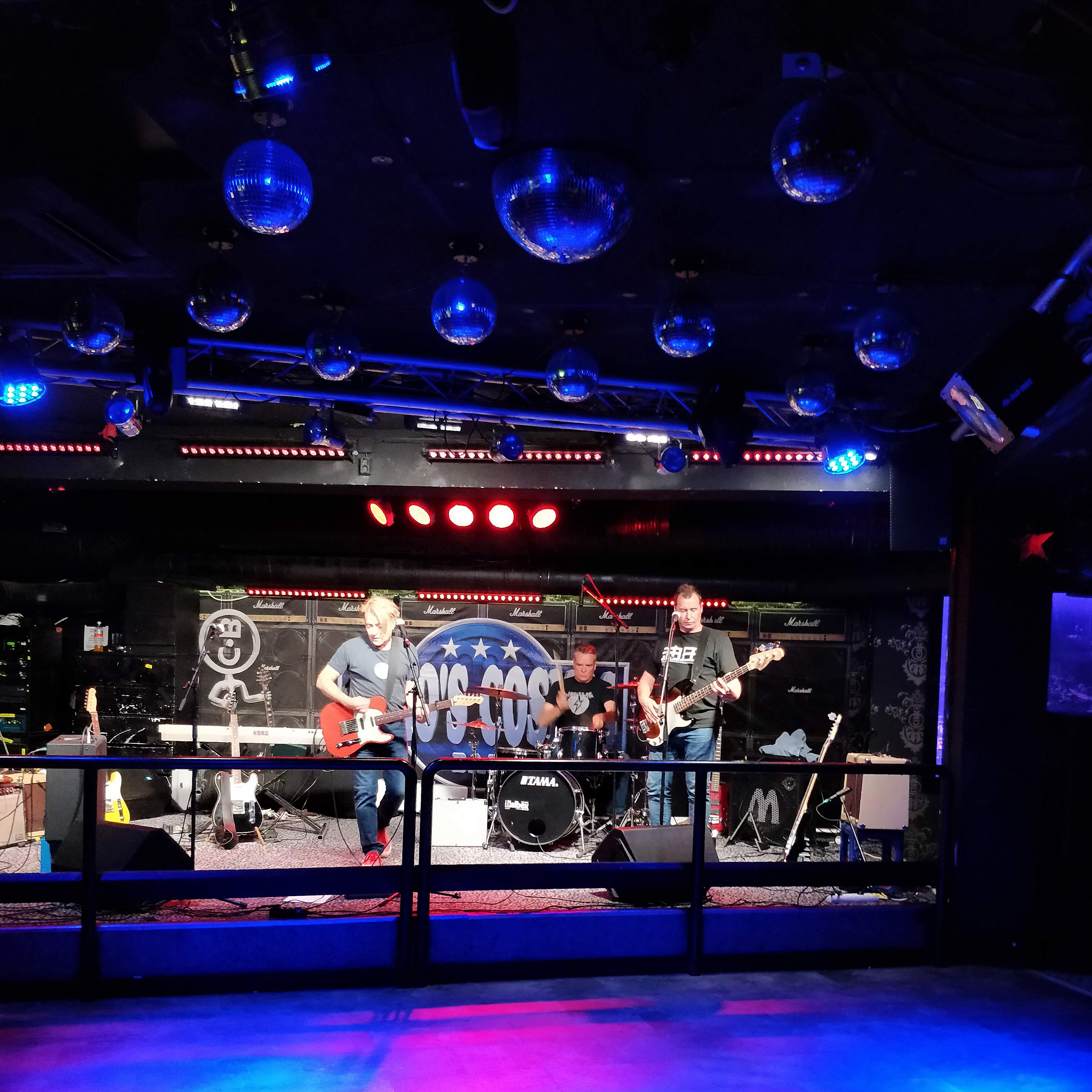 Nuorisopalatsin ensimmäinen keikka sitten 1986, paikkana Osmo's Cosmos Bar, Imatra, 31.8.2018